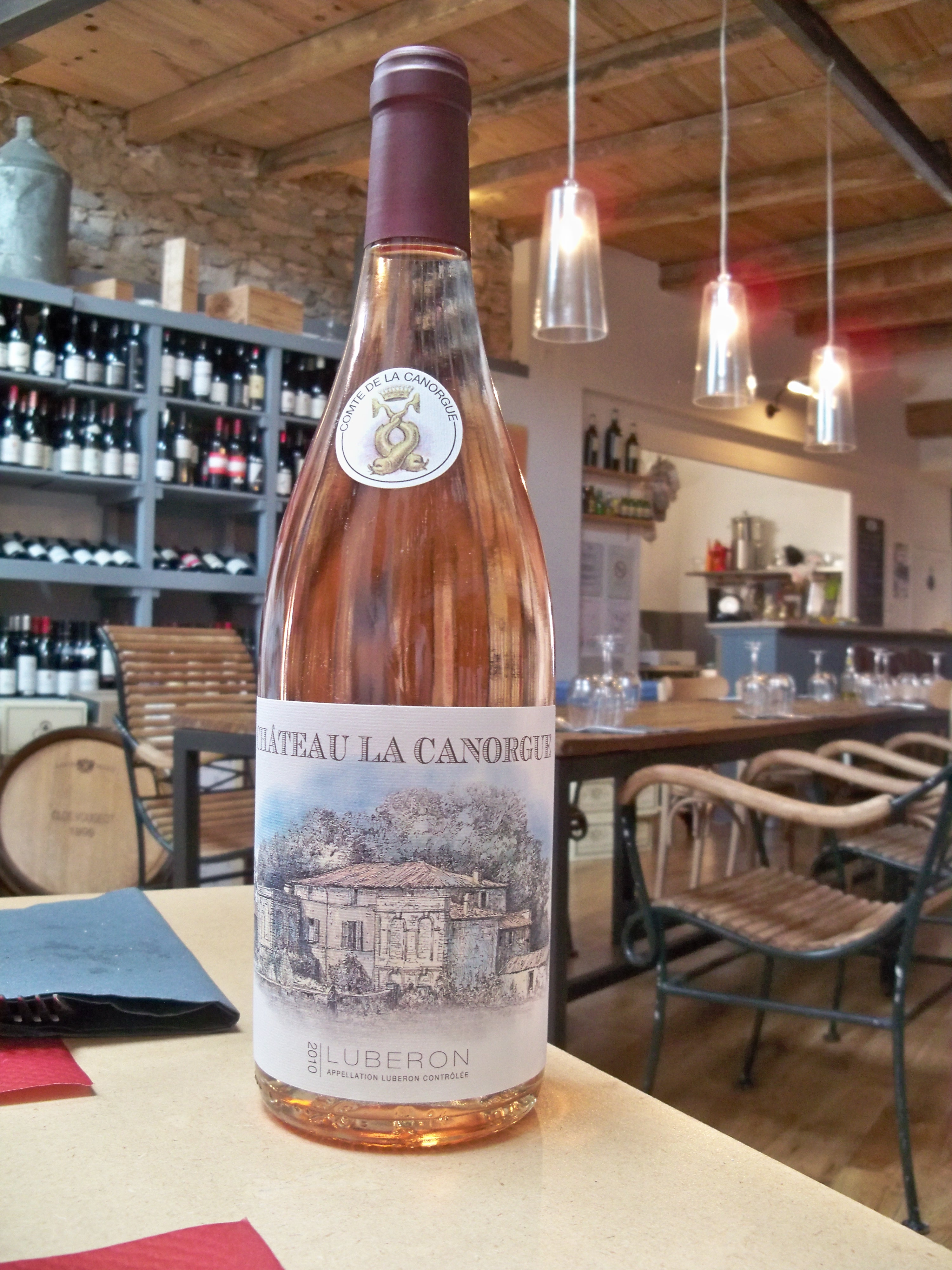 Bouteille de Chateau la Canorgue, Luberon AOC